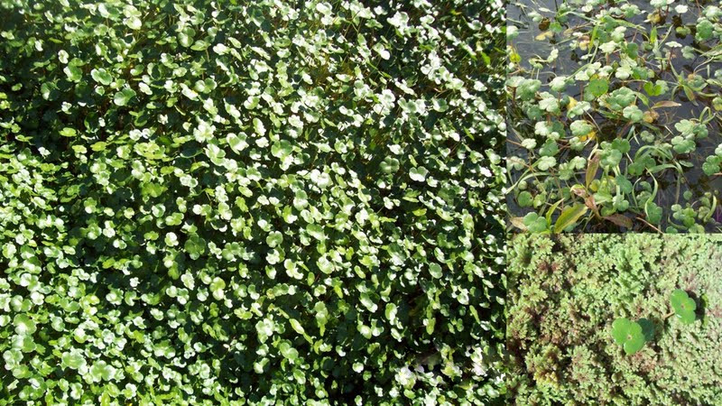 Hydrocotyle ranunculoides. Araliaceae. Fotos tomadas en pequeña laguna al margen del Río Negro en Palmar, departamento de Soriano y en suelo arenoso húmedo de cañada al margen del Río de la Plata en Carrasco, departamento de Canelones, Uruguay.